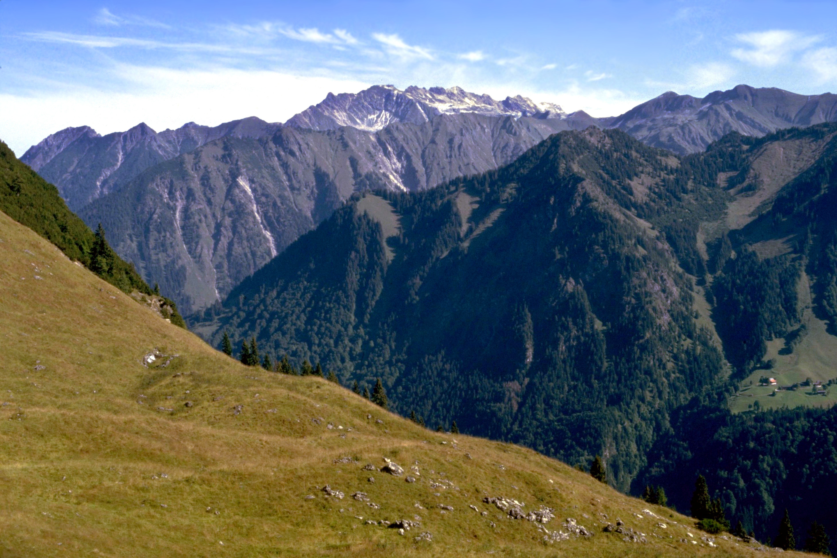 Höfats-Vorgebirge (der vorderste, bewaldete Bergzug) vom Himmelschrofenzug, dahinter ist die Daumengruppe zu sehen.